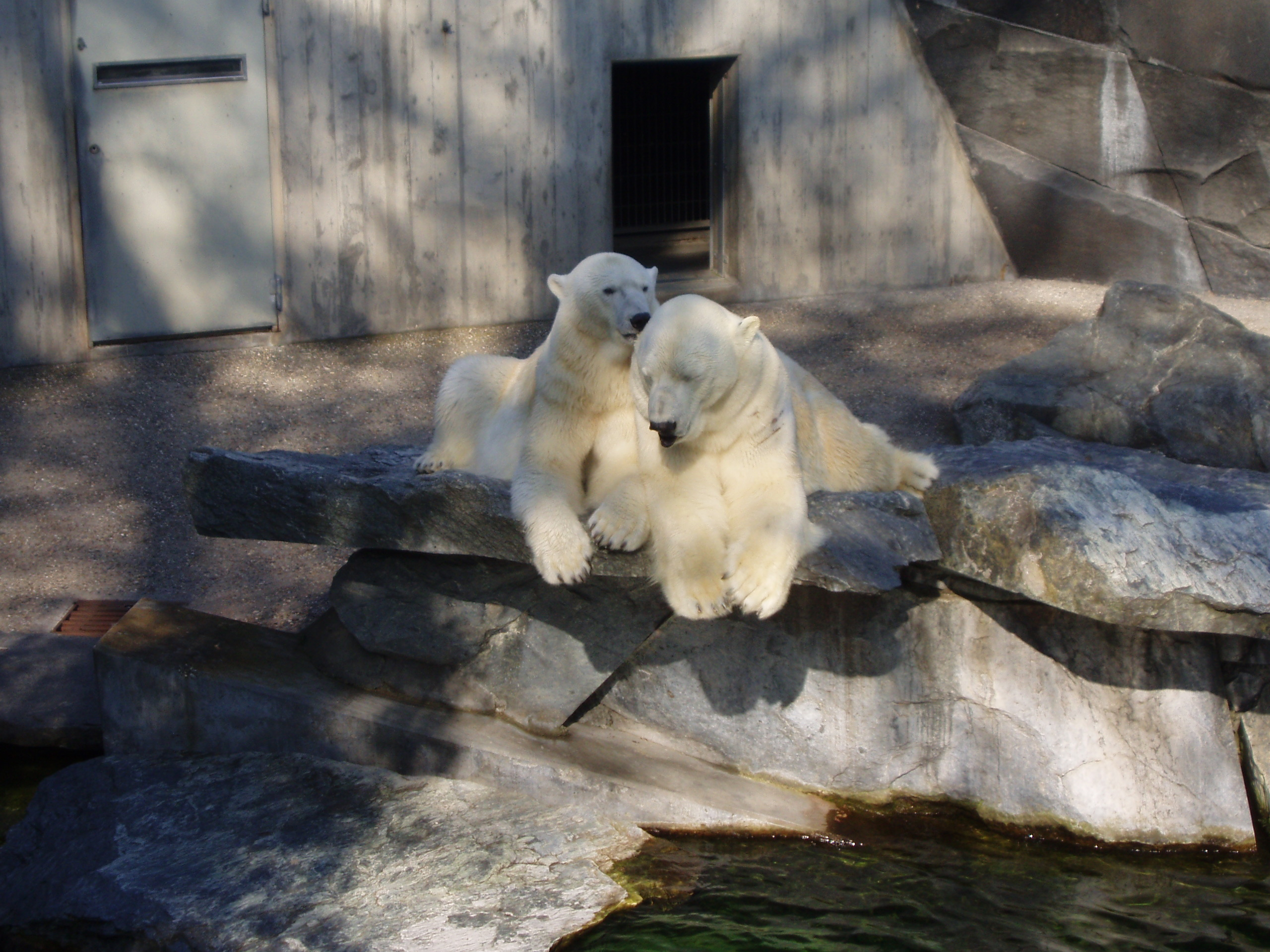 Eisbärenanlage